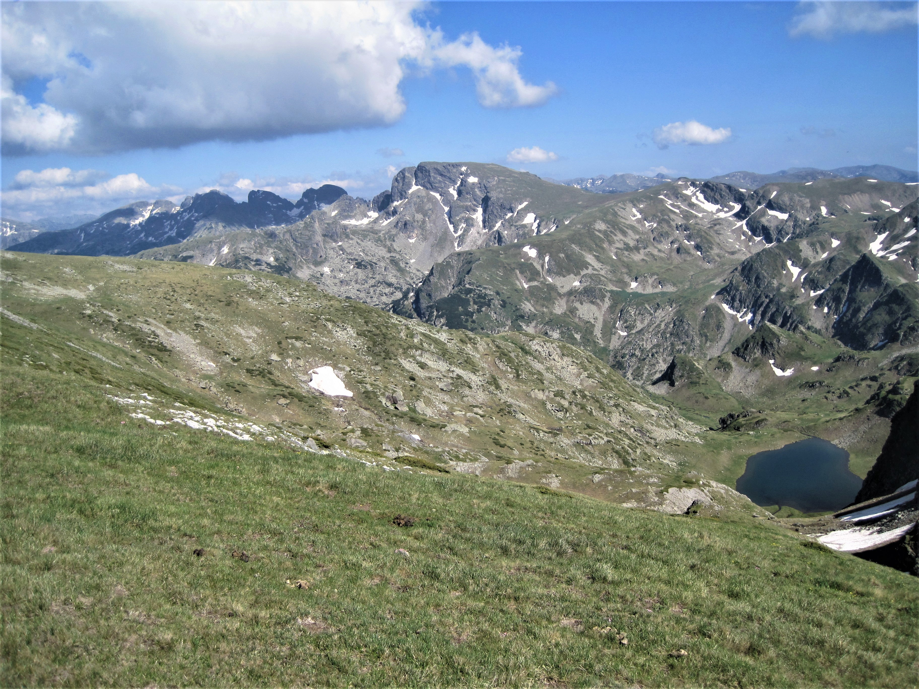 Мальовишки дял на Рила - основното било и Рибното Урдино езеро, снимани от Зелени рид.